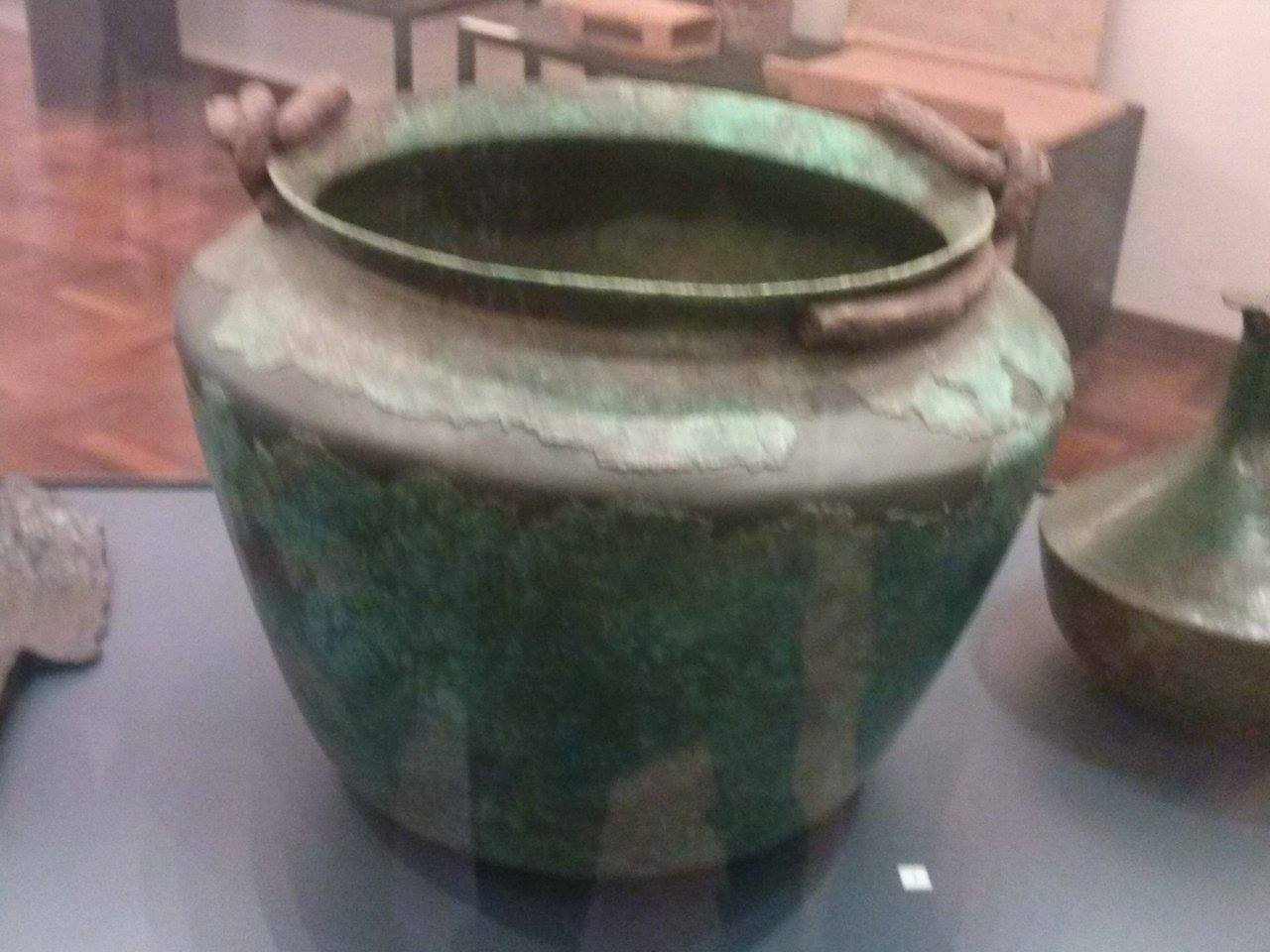 la caldaia di bronzo è conservata presso il museo archeologico di varese